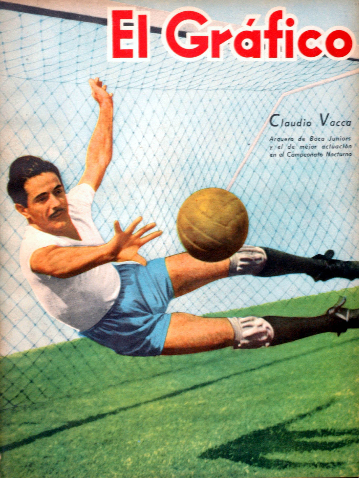 El Grafico del 02 de Abril de 1943. Edicion 1238